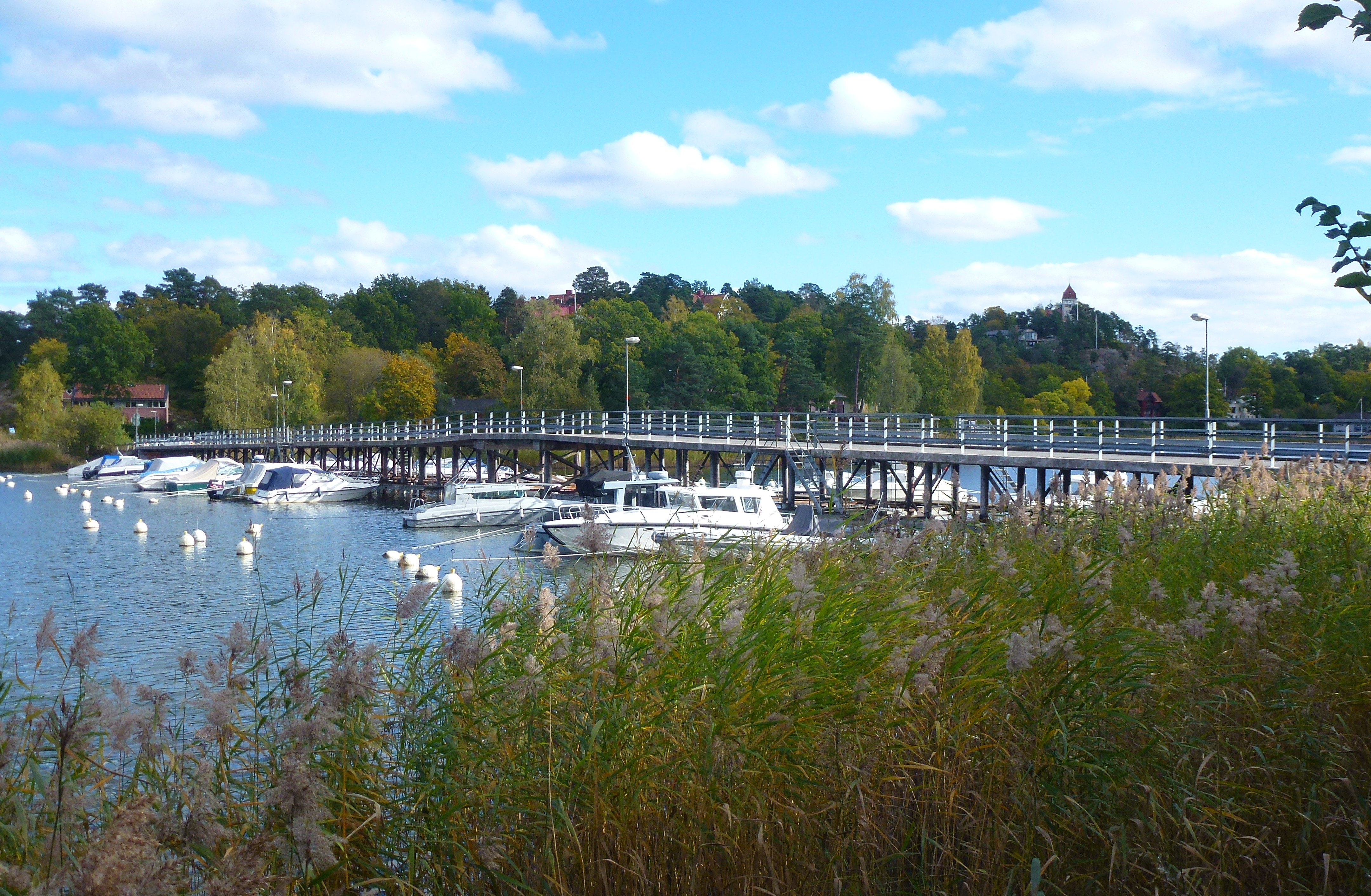 Tattbybron över Neglingemaren